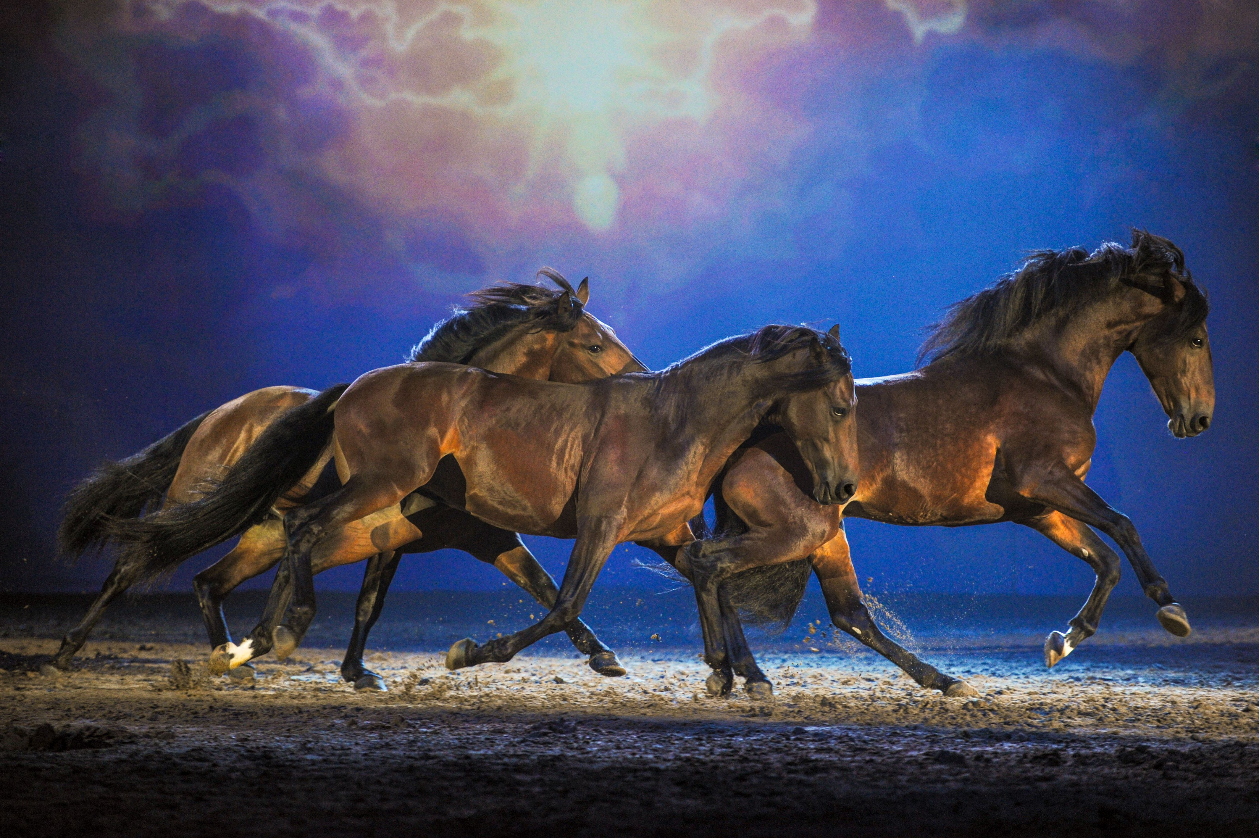 Freiheit der Alter Real-Hengste